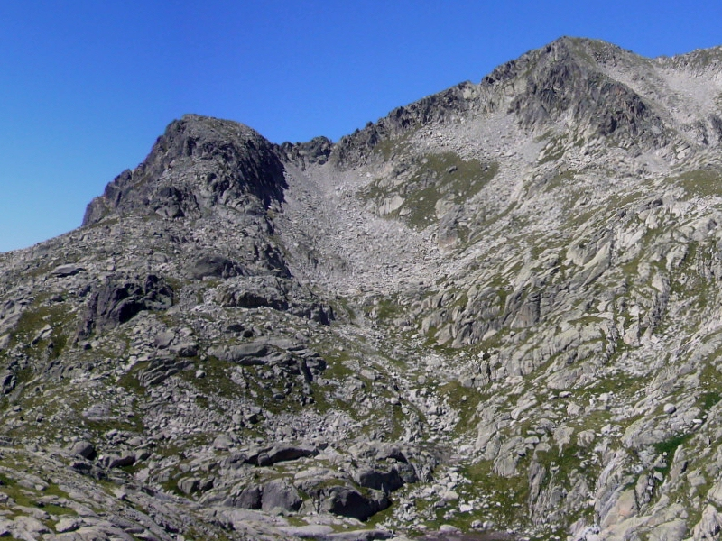 Tossal Esbonllat i Cap de la Pala Alta d'Estany Llong, vistos des de l'Estany del Bergús; Espot, Pallars Sobirà, Catalunya